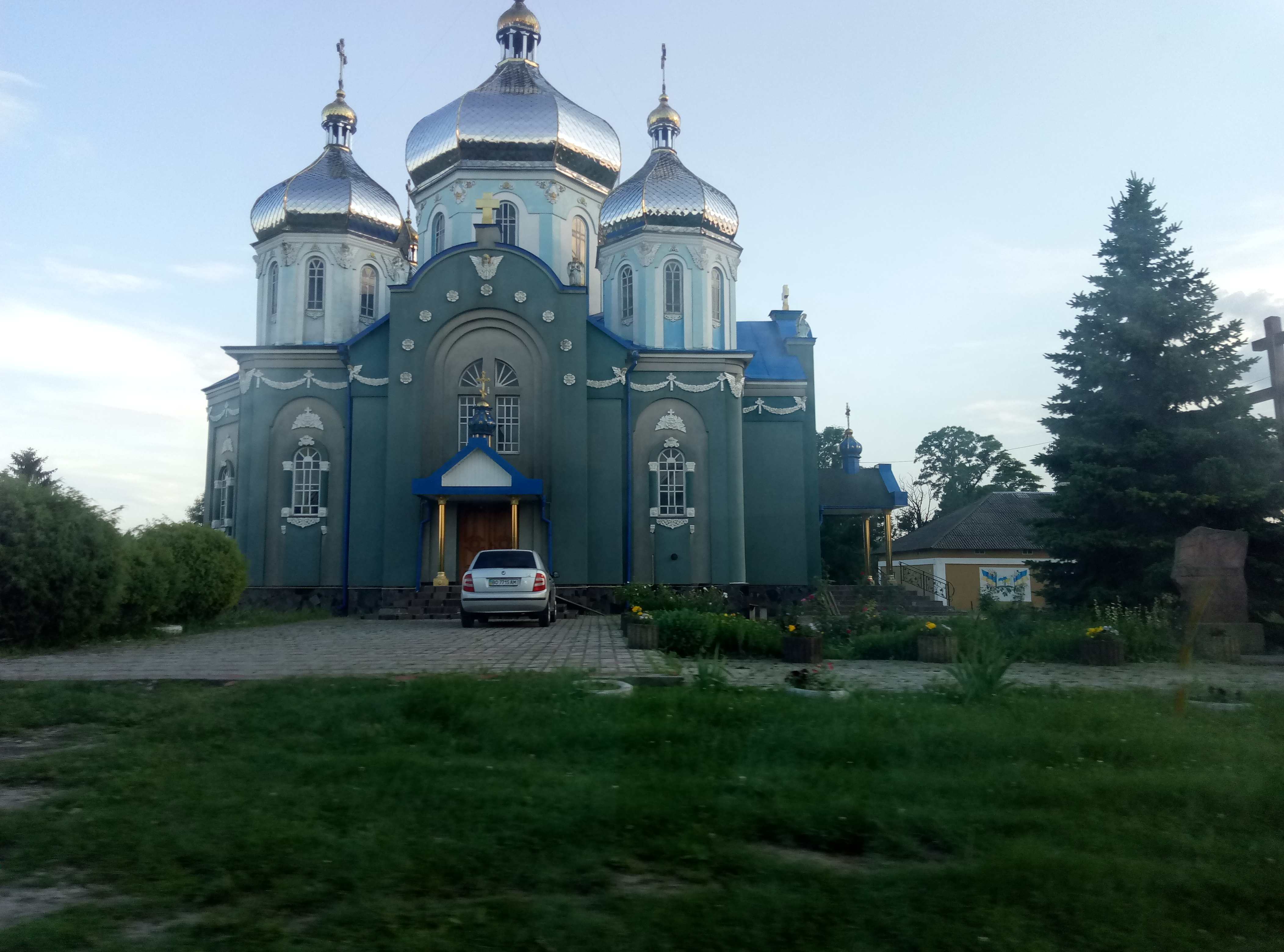 Церква св. Йоанна в Тютькові Теребовлянського району Тернопільської области.